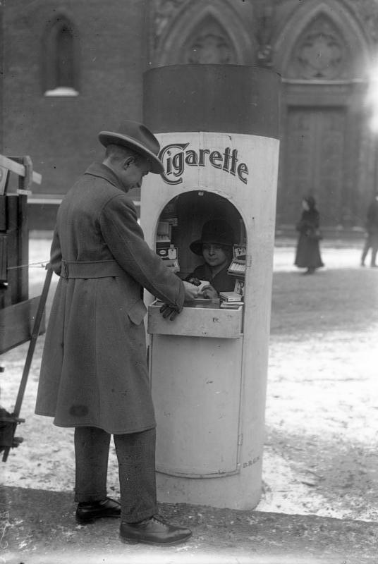 Ein origineller Zigarettenstand! Die Riesen-Zigarette als Verkaufsstand für Rauchwaren in den Strassen Berlins.